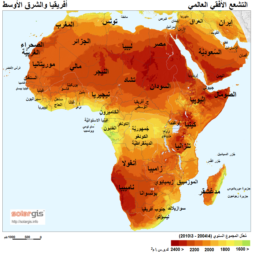 خارطة تُبيِّن التشعع الشمسي على سطح أفريقيا والشرق الأوسط.